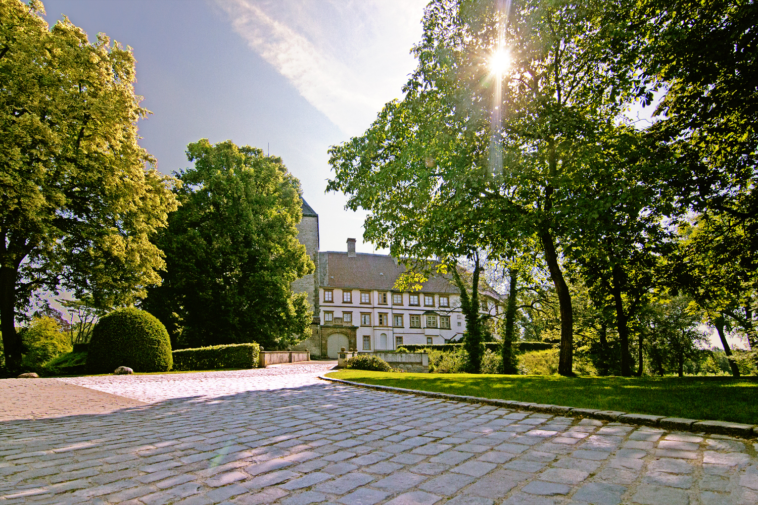 Der Schlossgarten und Park Das Parterre wurde zur Landesgartenschau der Stadt Rheda- Wiedenbrück nach historischen Plänen aus dem 19. Jahrhundert rekonstruiert. Der Garten dient heute zur Erholung der Bevölkerung und der Besucher. An den Rand des Schlossgartens wurde von Fürst Gustav zu Bentheim- Tecklenburg gegen Ende des 19. Jahrhunderts die Orangerie im klassizistischen Stil erbaut. Derzeit wird das Gebäude für kulturelle Veranstaltungen genutzt. Der Schlosspark ist gerahmt von der Ems, der Hirschwiese und dem Roten Pfuhl. Diese Grundstruktur war bereits im 17, Jahrhundert vorhanden. Damals entstand ein dreieckiges Sternboskett mit hohen Buchenhecken, dessen Form sich noch heute erahnen läßt. Die Schlosswiesen hinter dem Schloss wurden ehemals als Bleichen genutzt. Anlässlich der Landesgartenschau 1988 wurde die Fläche zu einem Naturschutzgebiet entwickelt. Angrenzend daran ist der Park der Flora Westfalica mit vielen Attraktionen für jede Altersgruppe.